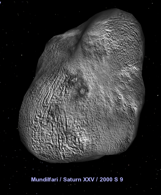 Programmi Celestia koostatud pilt Mundilfarist